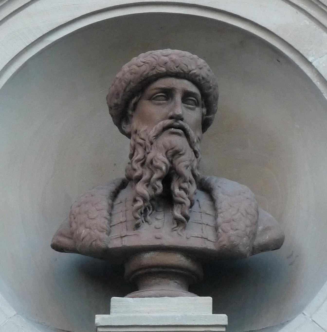 Buste de Jean (Johann) Mentelin (angle de la place des Etudiants et de la rue de l'Outre), Strasbourg. XIXe s.